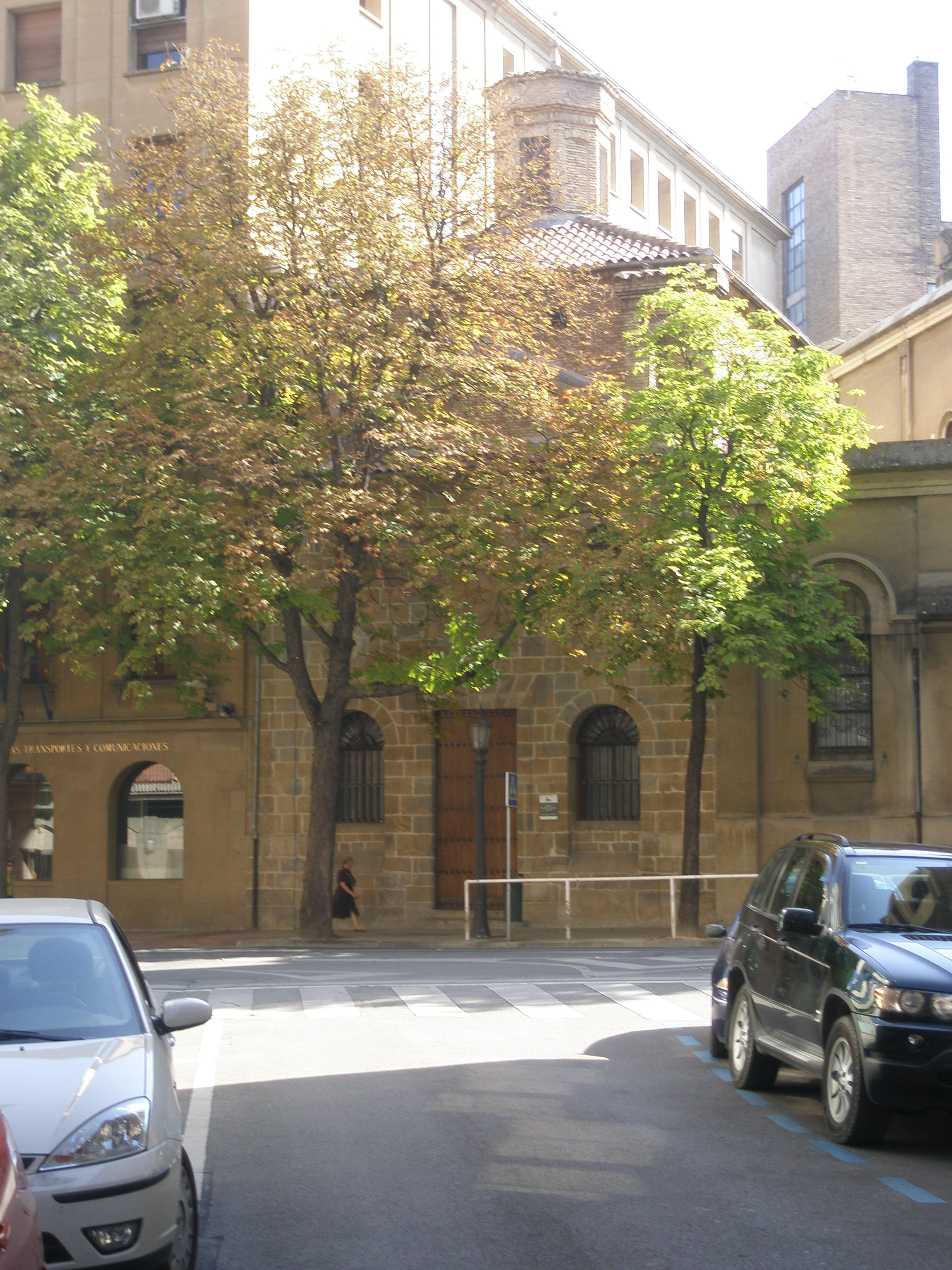 Capilla de San Ignacio de Loyola del siglo XVII. Fue construida donde cayó herido. Tirada en su mayor parte con la construcción del II Ensanche.Solo se conserva la nave central.